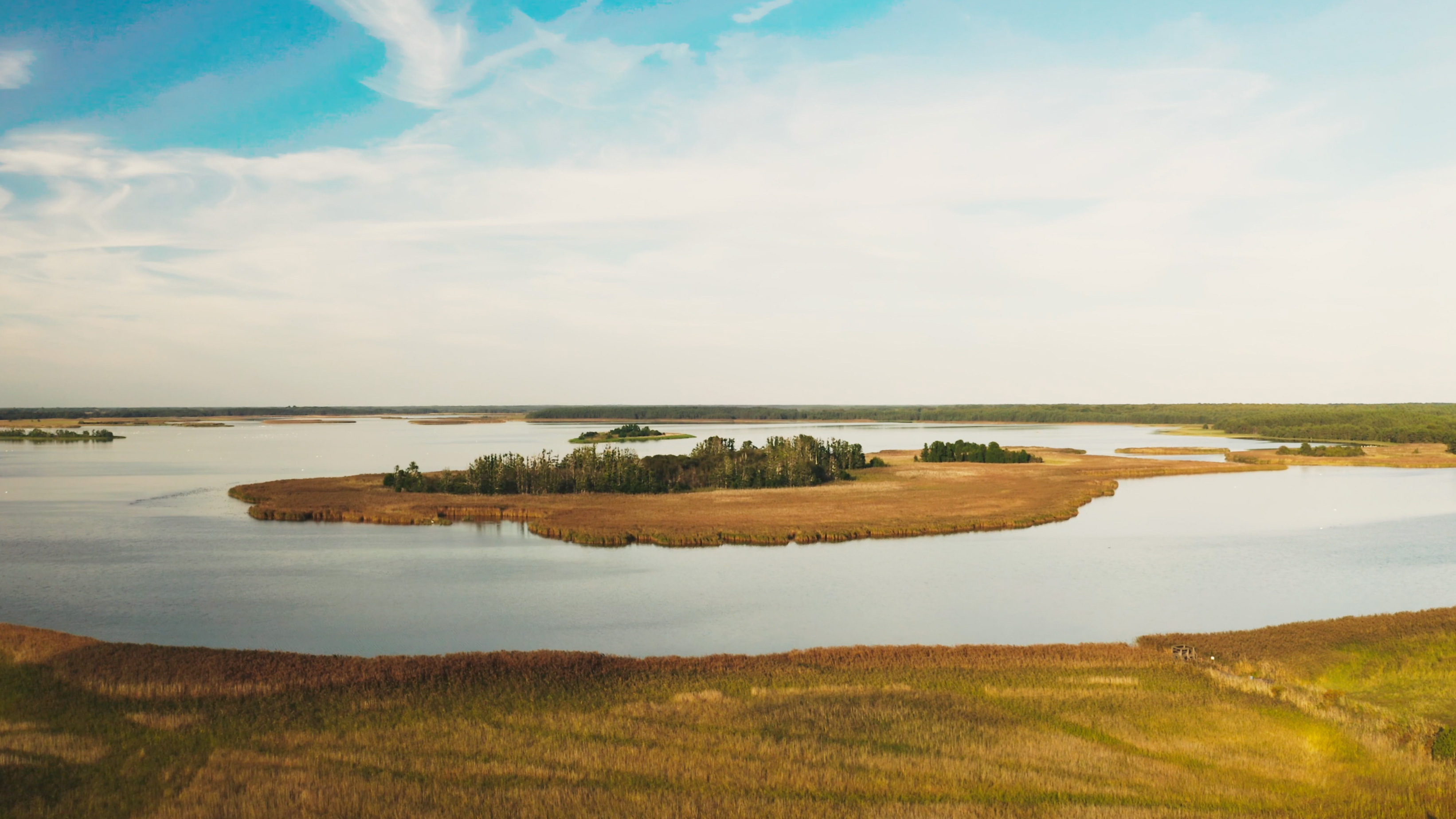 Käina meremudamaardla (2019)